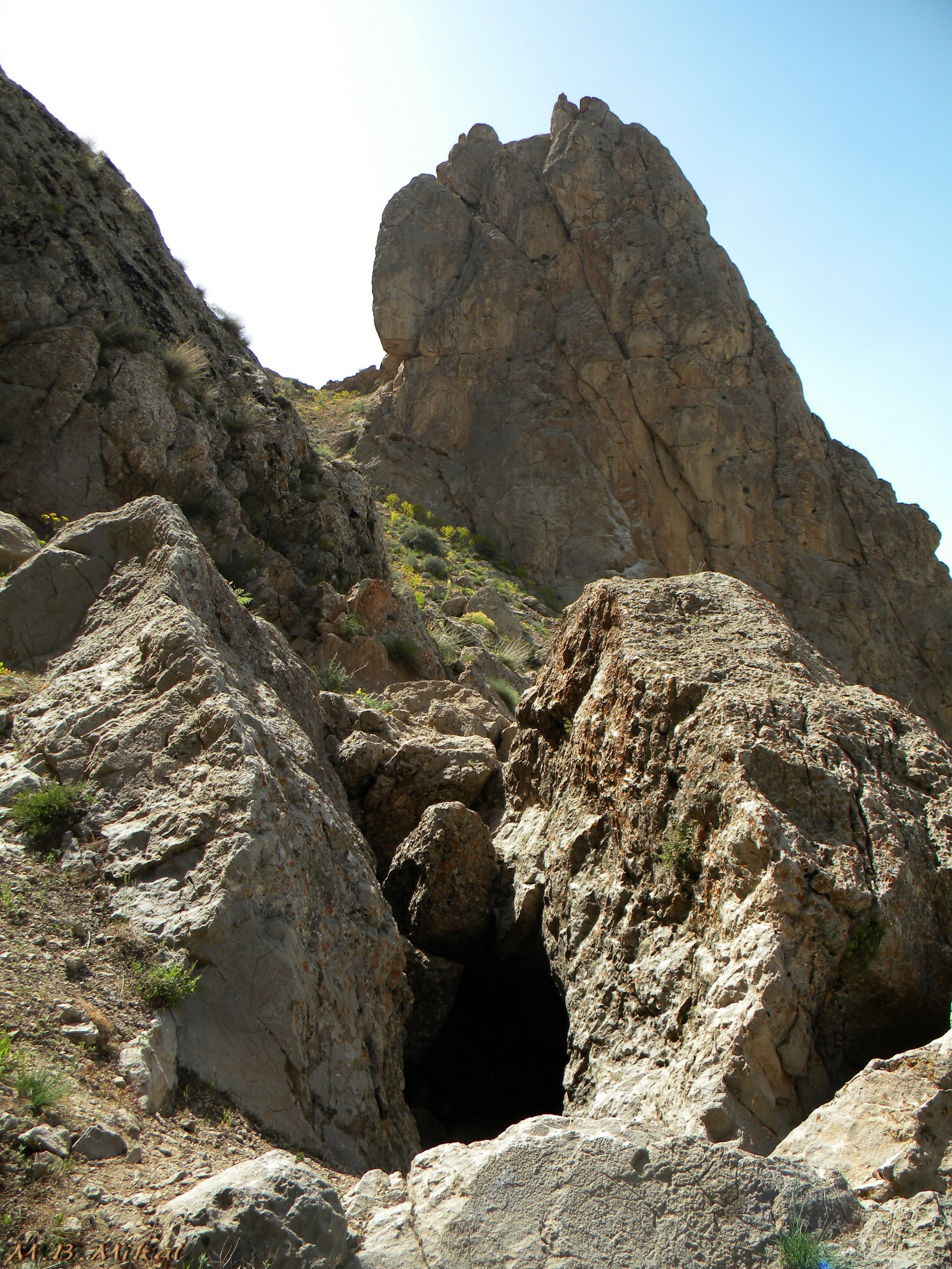 ورودی غار گلجیک - Goljik cave